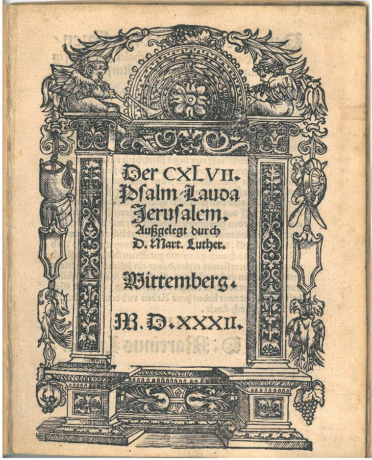 Das älteste Stück im Archiv des Liberalismus: eine Originalschrift Luthers aus dem Jahr 1532. Das kleine Bändchen im unscheinbaren Pappeinband ist über den Nachlass von Walter Scheel nach Gummersbach gekommen und handelt von der Auslegung des 147. Psalms. Solche Auslegungsschriften publizierte der Reformator im Vorfeld der ersten vollständigen Bibelübersetzung, die 1534 vorlag. Der bekannte Psalm 147, der auch den Namen „lauda Jerusalem“ (Lobe, Jerusalem) trägt, ist später desöfteren vertont worden, so von C. Monteverdi oder A. Bruckner.